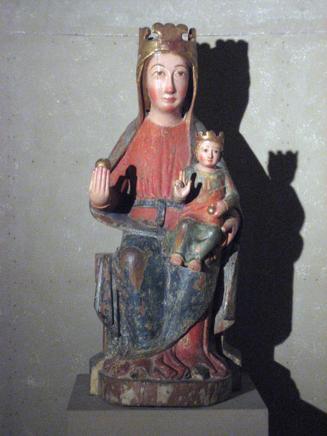 La Virgen de Ginestarre es una talla románica en madera policromada procedente de la iglesia de Santa María de Ginestarre y conservada en el Museo Diocesano de la Seu d'Urgell (Lérida)